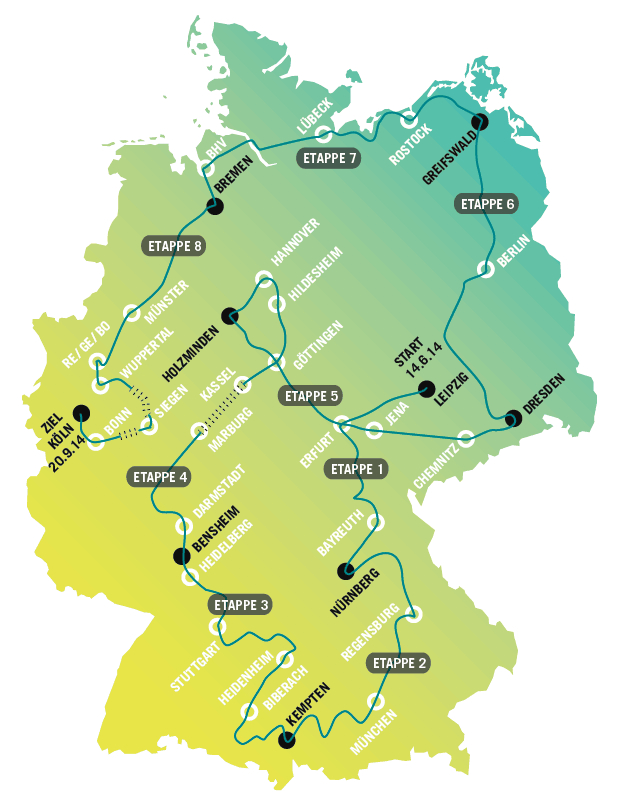 Karte der zweiten Mood-Tour